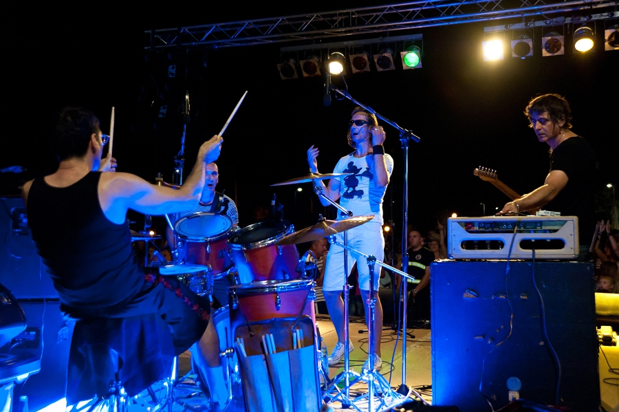 Davor Gobac i Psihomodo pop